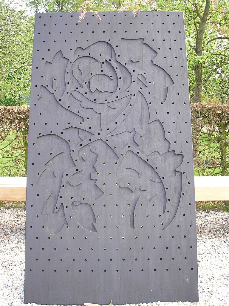 Tuin van Bezinning; Bloemenbord met zelfde motief als het ontwerp van de tuin. Nationaal monument ter ere van tijdens de uitoefening van de dienst overleden Nederlandse politiemensen. Locatie: Achter koetshuis van Huis 't Velde te Warnsveld (NL) Foto: Pudding4brains, 5 mei 2006 - Volledig vrijelijk te gebruiken ('Publiek Domein') Categorie:Afbeelding Tuin van Bezinning